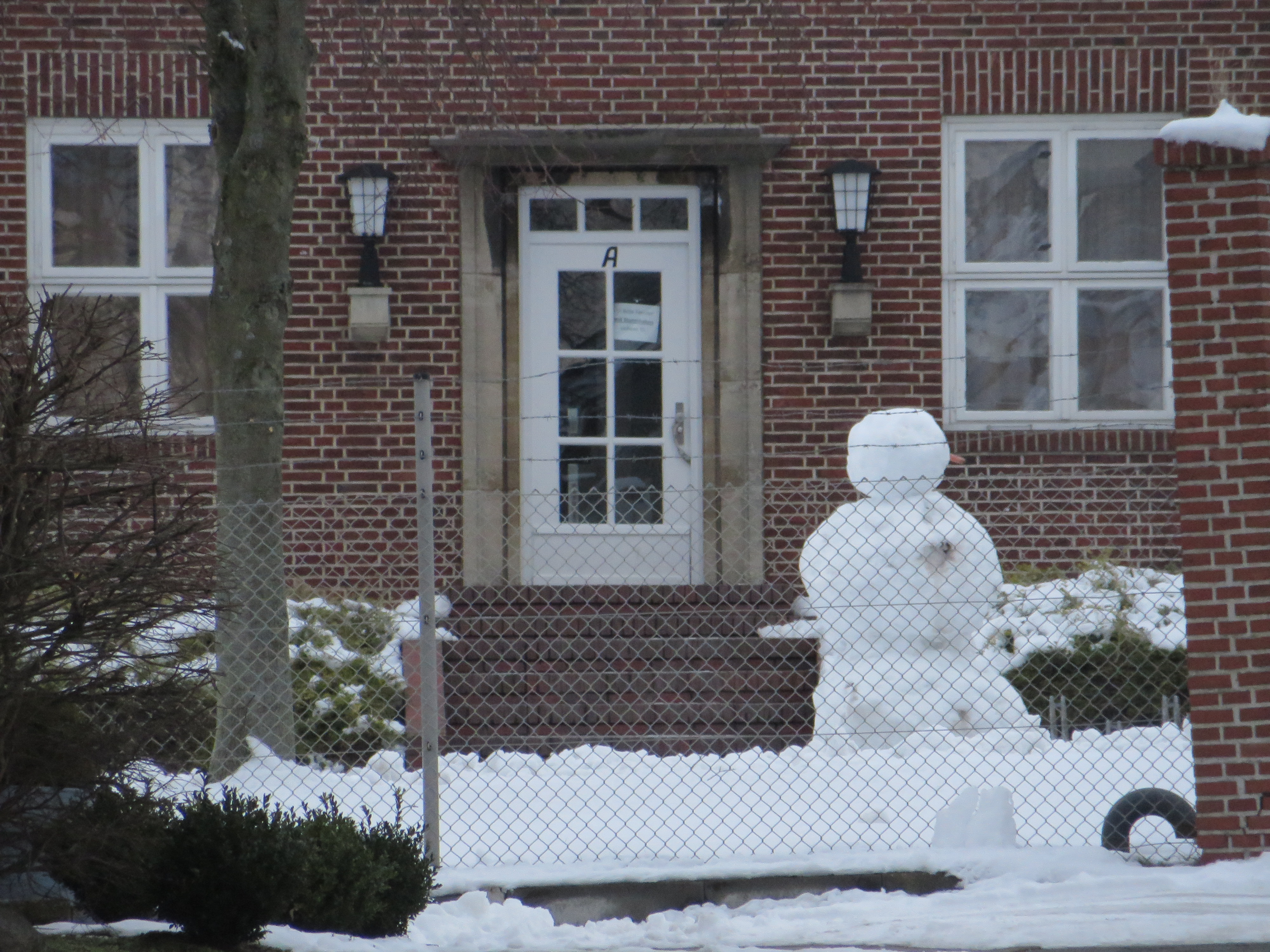 Schneemann vor Gebäude der Marinesportschule wo letzte Reichsregierung verhaftet wurde (Flensburg-Mürwik 2015), Bild 01